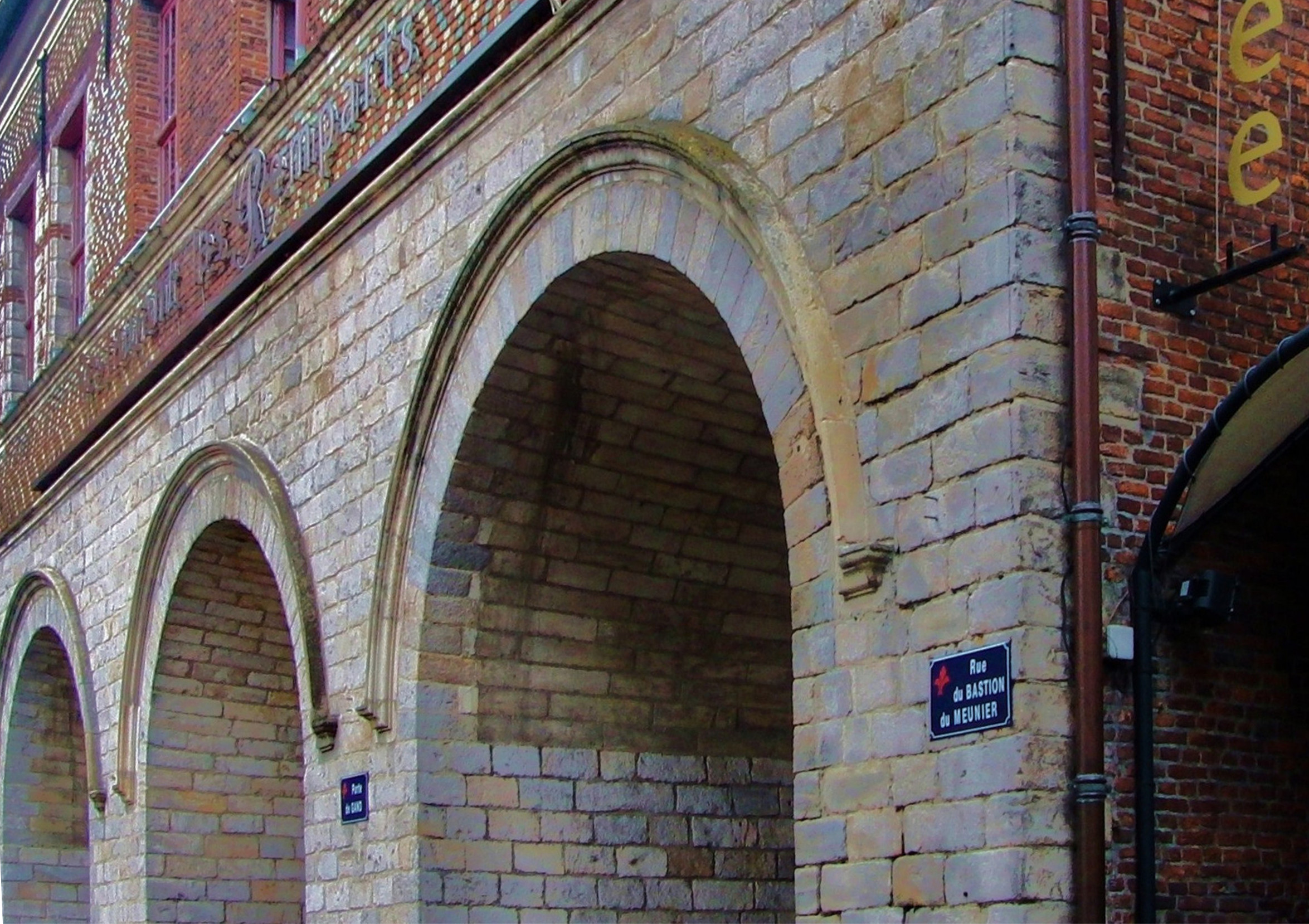 Entrée de la la rue du Bastion-du-Meunier et la porte de Gand à Lille Nord, (vue de la façade Sud). Érigée en 1620.